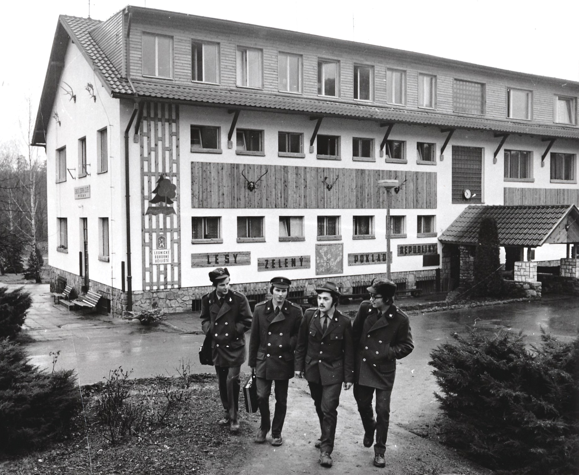 Učni v lesnických uniformách před učilištěm v Křivoklátě